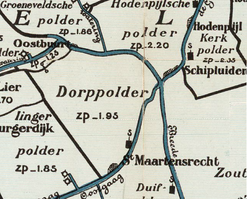 Dorppolder